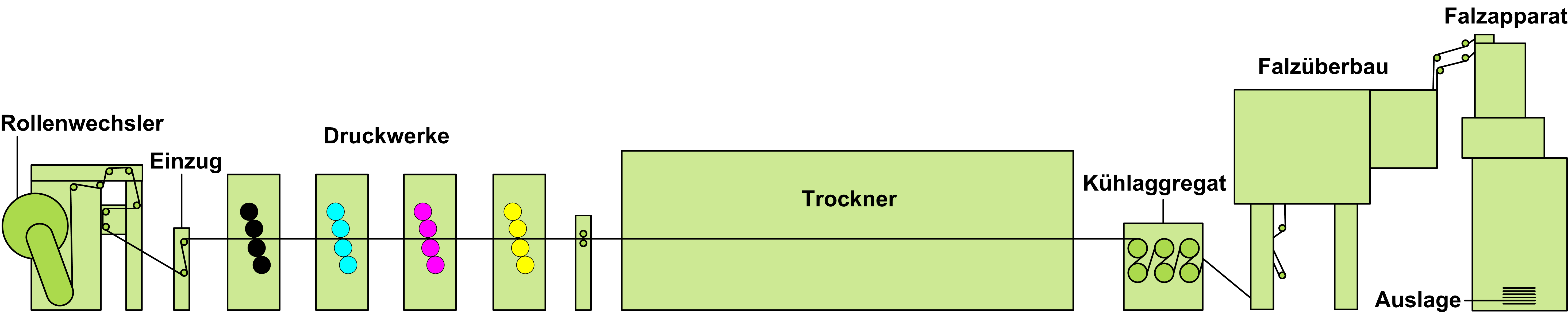 Die Abbildung zeigt das Schema einer Heatset-Rollenoffsetdruckmaschine mit I-Druckwerken in der Bauweise der manroland AG.